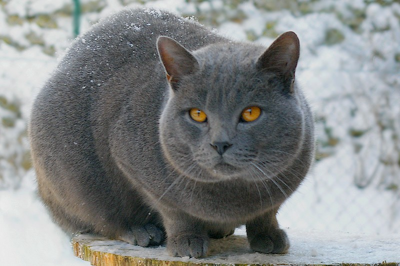 mâle chat des chartreux, Bonheur des Nuits Indiennes